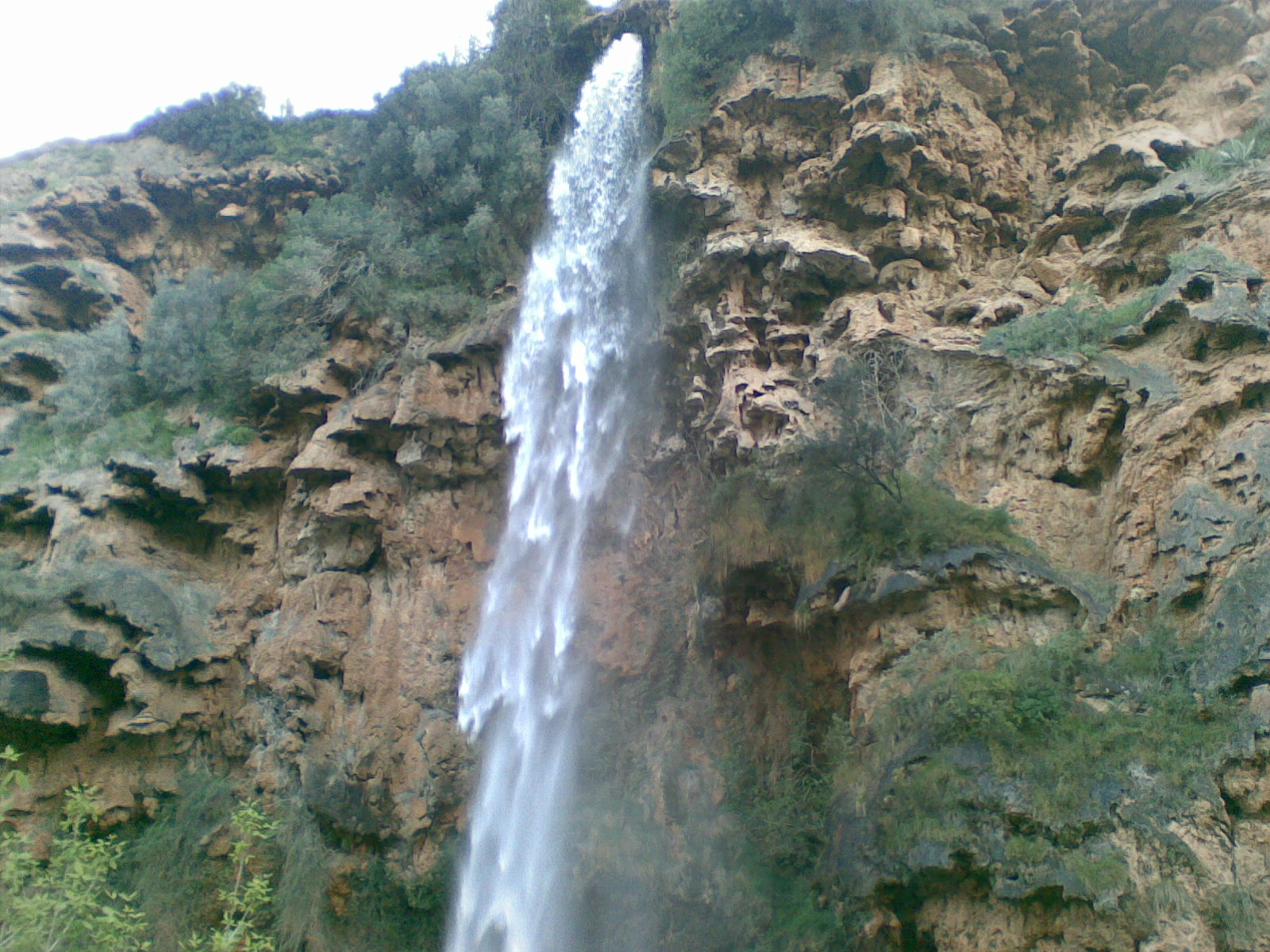 Cascada del Salto de la Novia en Navajas (Castellón, Comunidad Valenciana)